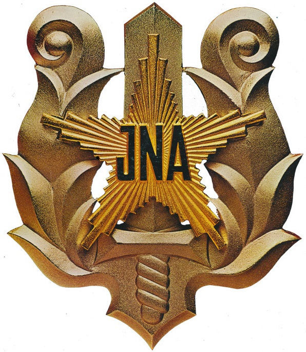 Emblem glasbenih enot v JLA